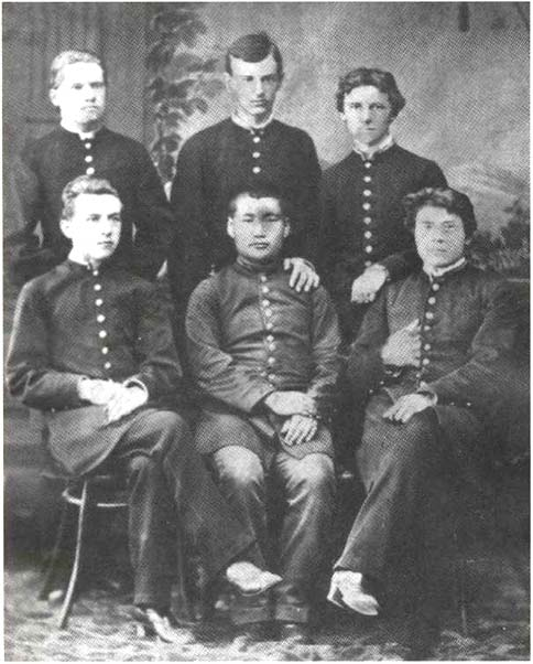 Н.Ф. Катанов (1862 - 1922) - сидит в центре - гимназист Красноярской гимназии